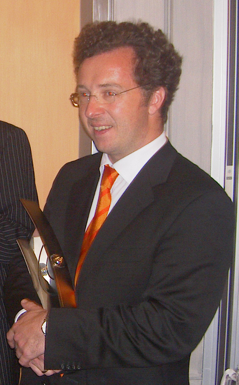 Christian Gerhaher währende der Echo-Klassik-Party 2004